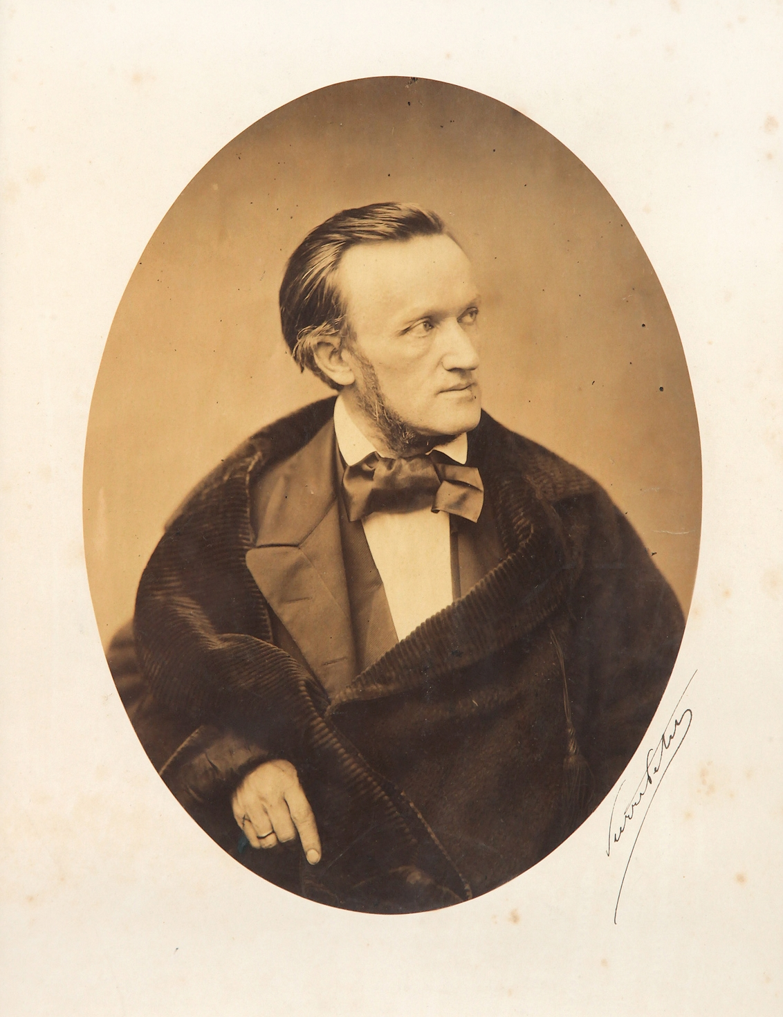 Portrait de Richard Wagner par Pierre Petit, 1861, Épreuve photographique ovale sur papier albuminé, avec la signature manuscrite Pierre Petit. Vente Sotheby's 15 décembre 2010, Paris. n° de lot 172 (5 000 €).